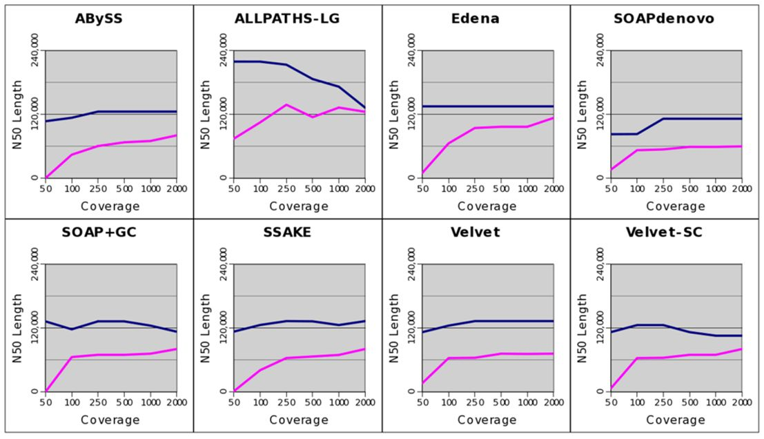 Genomo surinkimo baigtinumo priklausomybė nuo perdengimo.